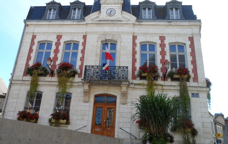 Il s'agit de la mairie de Saint-Julien-du-Sault (Yonne) France, construite en 1886.